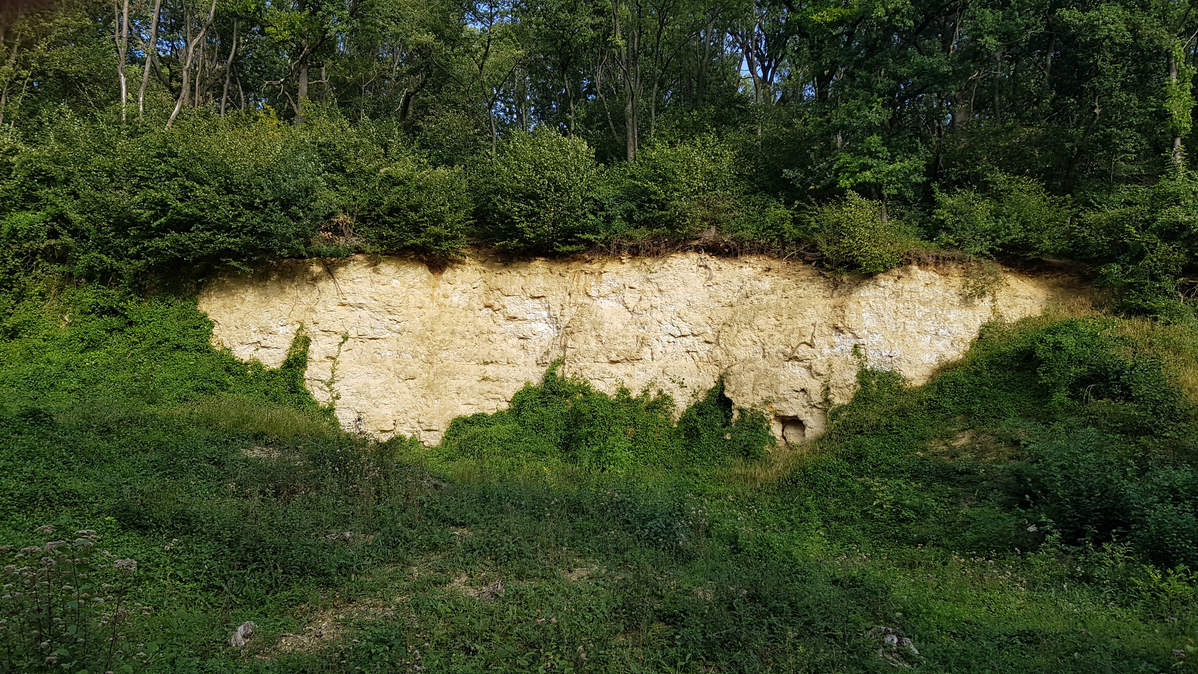 Groeve Putberg bij Ubachsberg, gemeente Simpelveld, Nederland